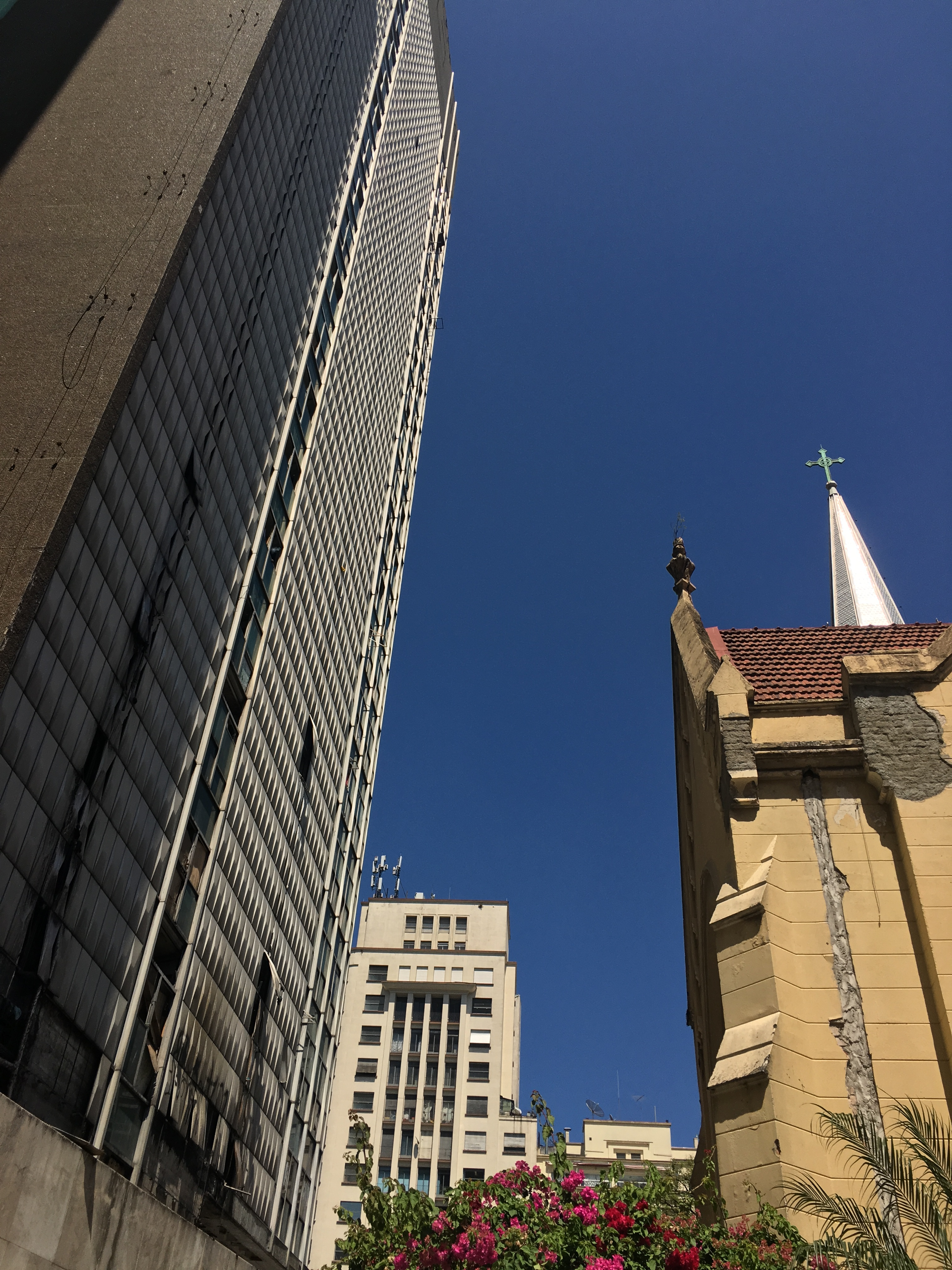 Visão traseira da lateral direita da Igreja Luterana Martin Luther, no Largo do Paissandu (São Paulo-SP, Brasil), com detalhe para o prédio abandonado e ocupado ao lado da igreja.